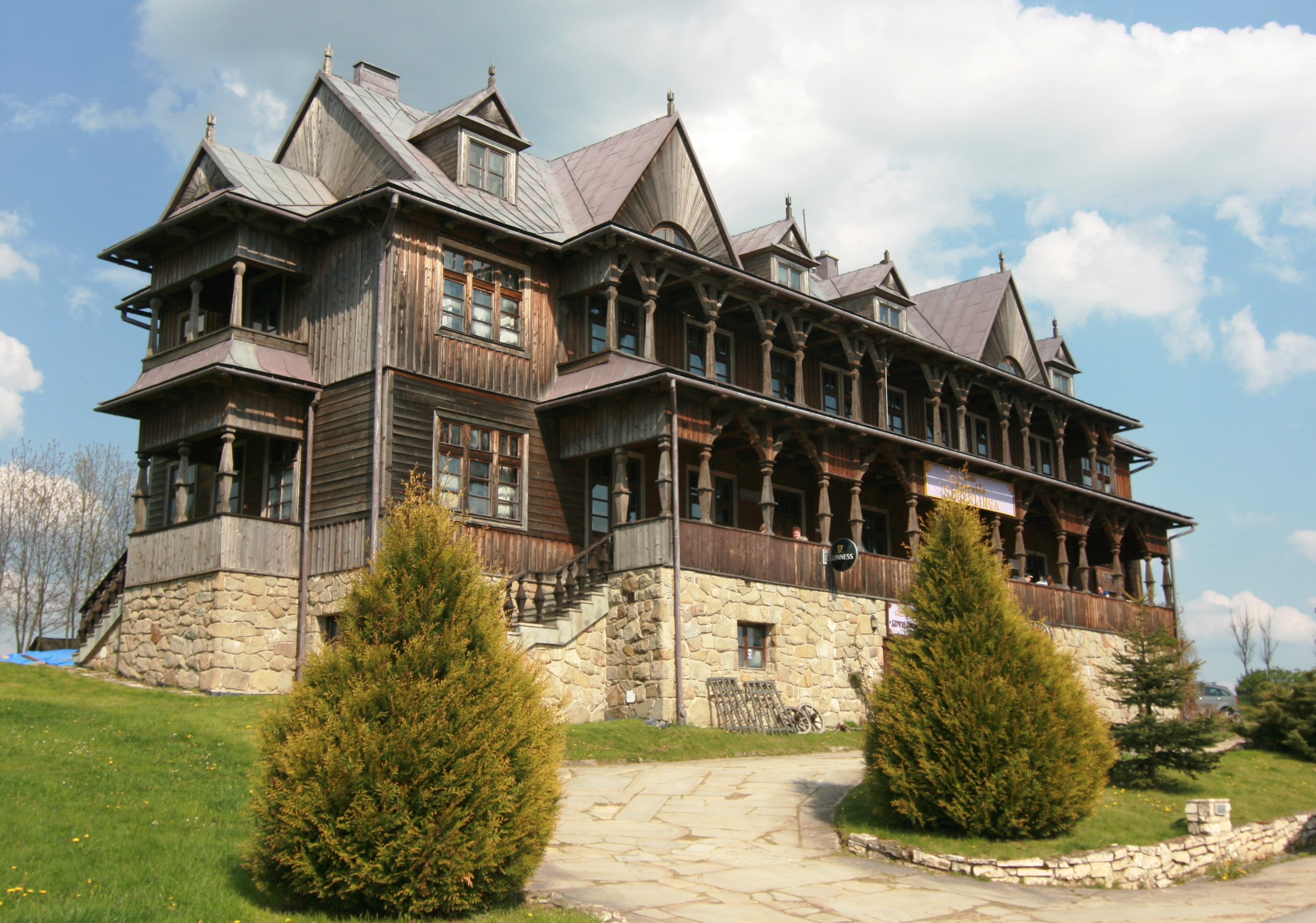 Willa Szperlinga w Osadzie Czorsztyn - widok od południowego zachodu